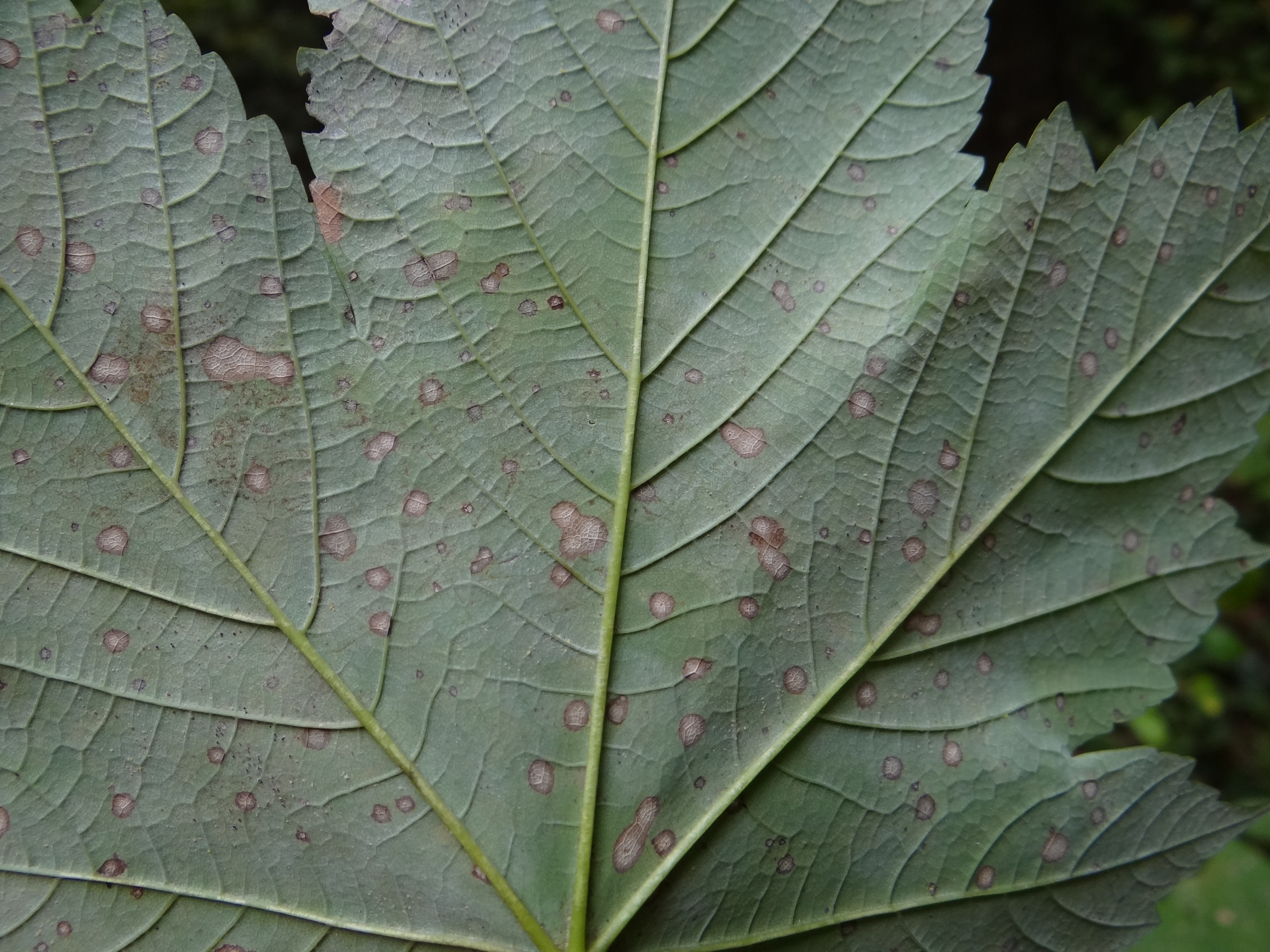 Cristulariella depraedans on leaf Acer campestris. Location: Poland, Dolina Będkowska